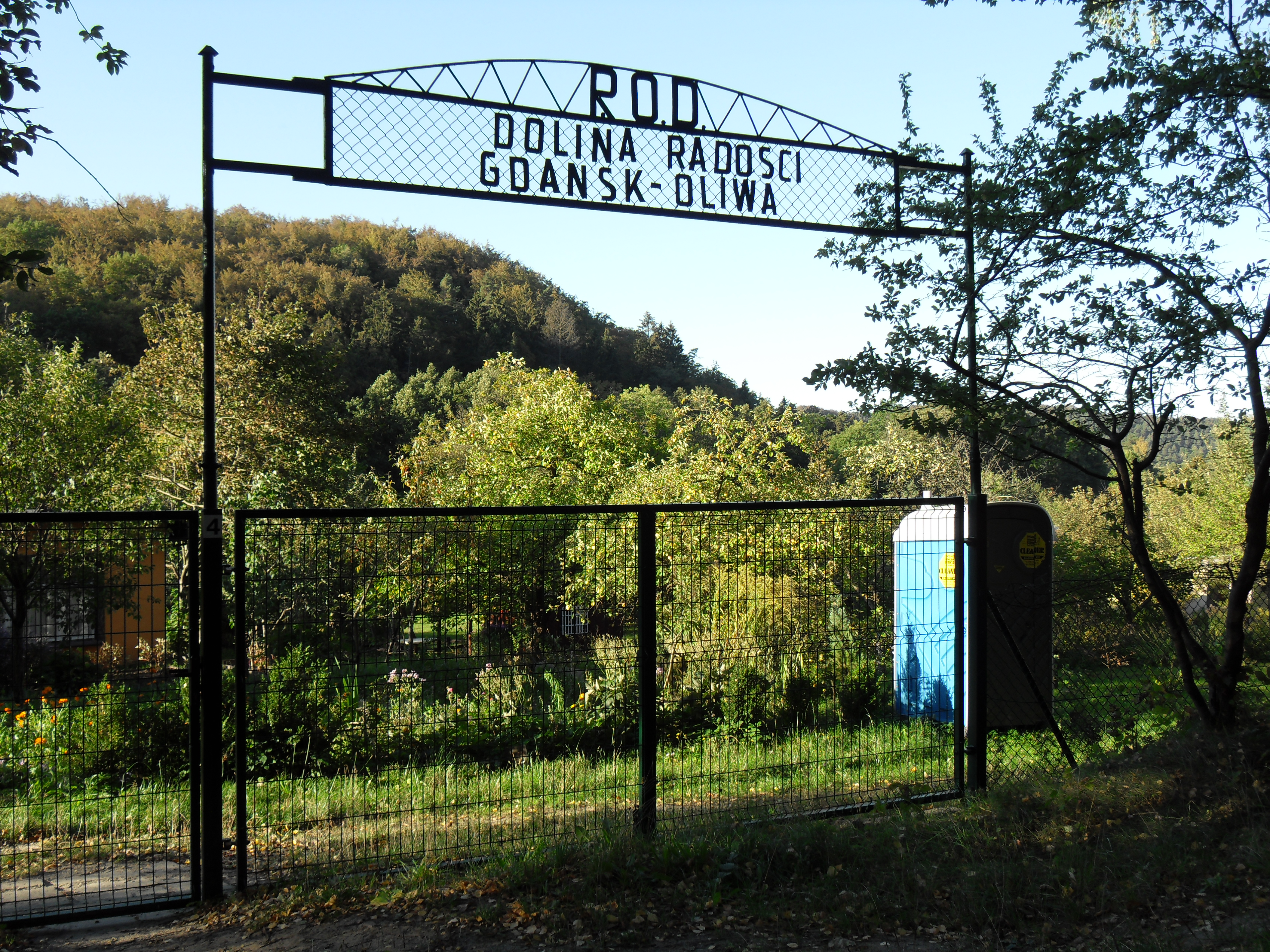 Gdańsk Oliwa. Dolina Radości, ogródki działkowe.